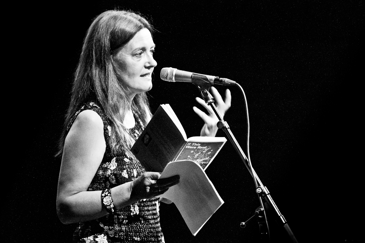 Měsíc autorského čtení 2014